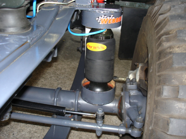 suspensao automotiva